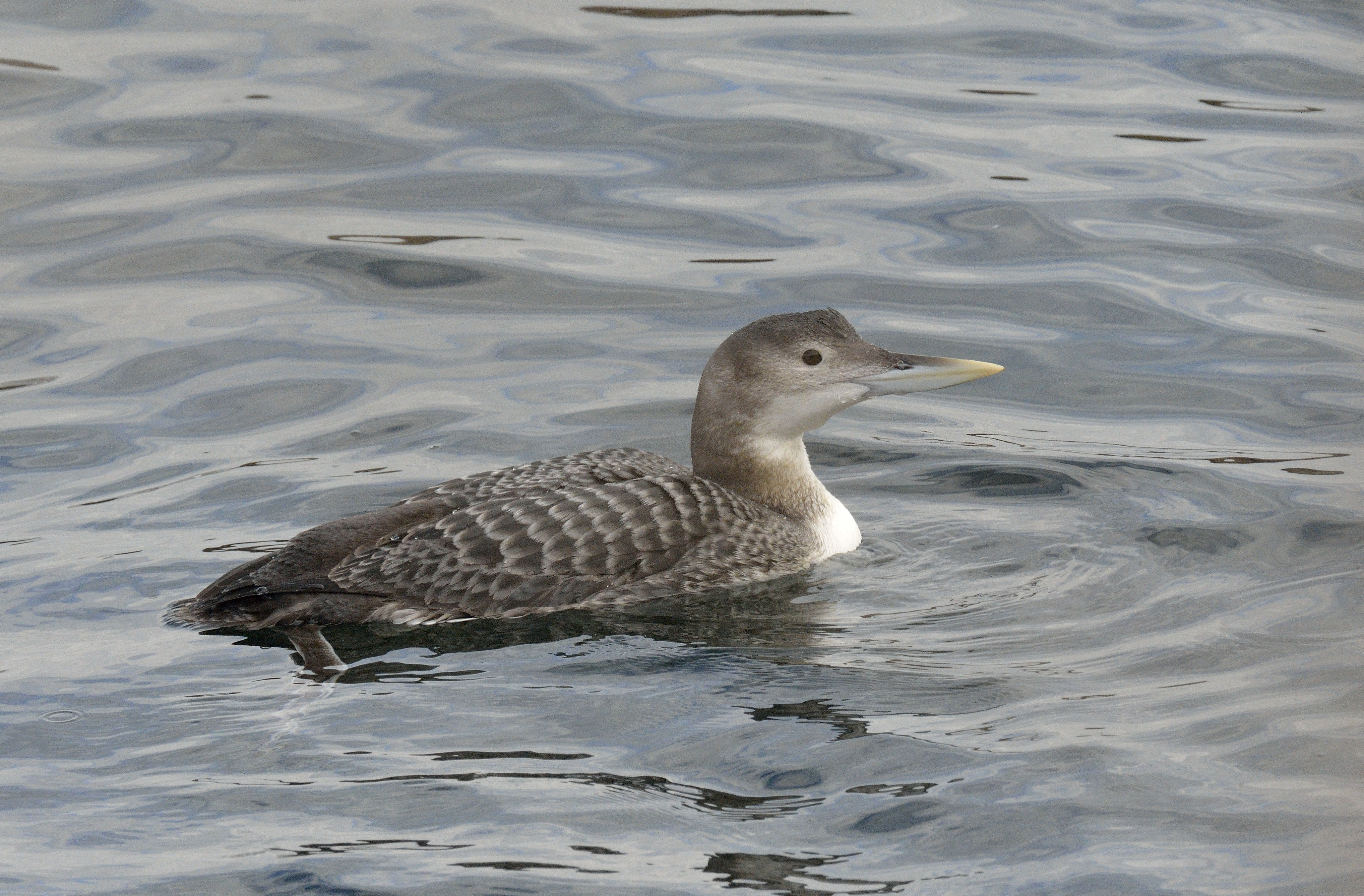 Gelbschnabeltaucher im Bereich der Neuen Donau in Wien